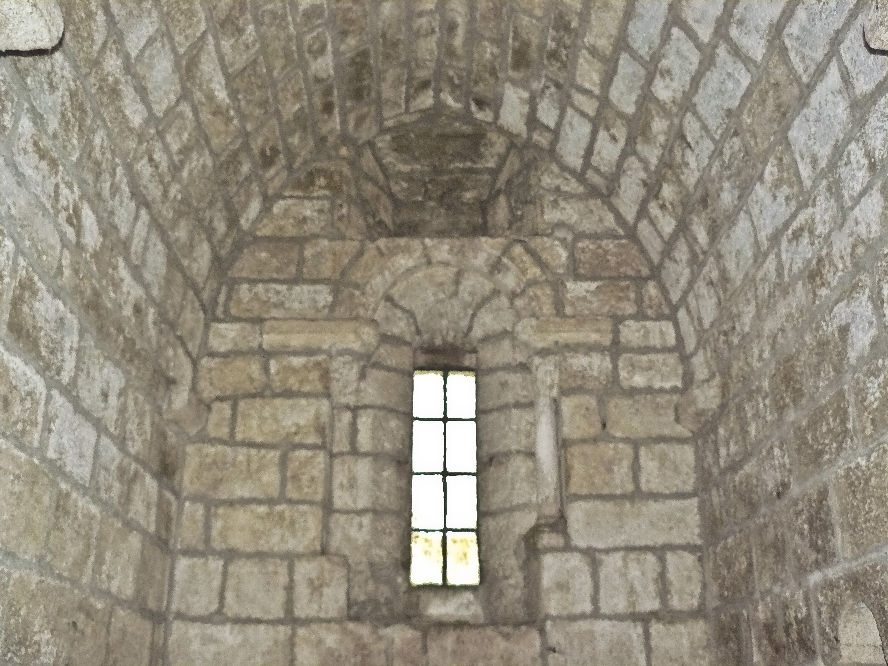 Capela lateral da igrexa do Mosteiro de Santa María de Oia